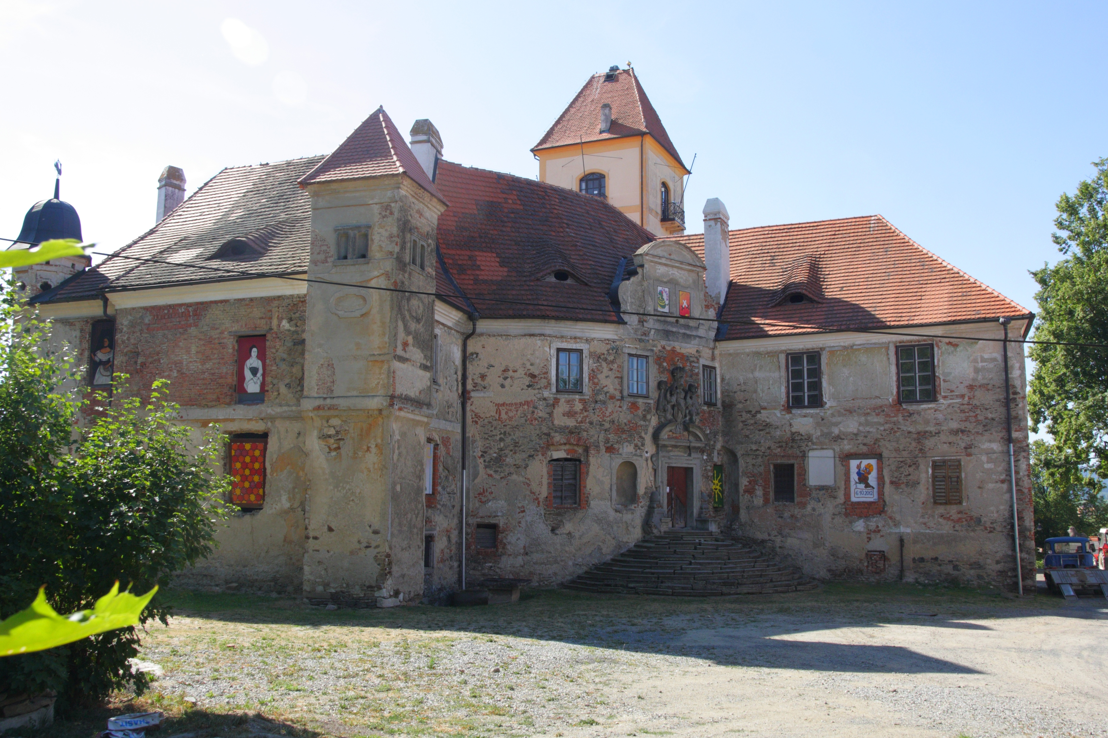 Poběžovice - zámek.